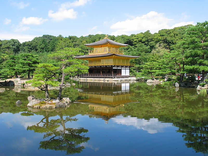 Kinkakuji, Il Padiglione d'Oro